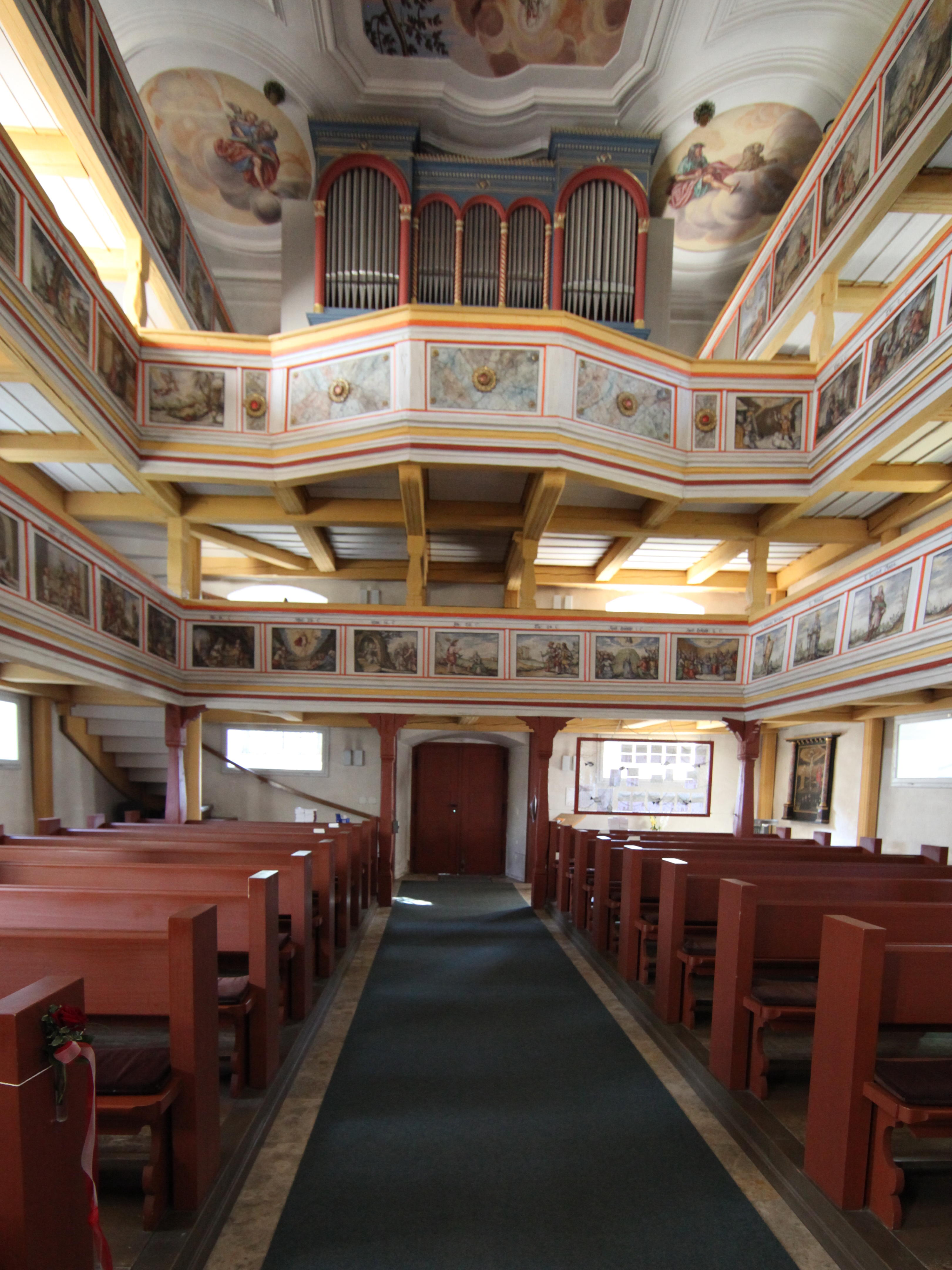 Michaelskirche in Fechheim